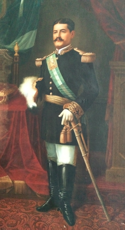 Retrato del general Jose Maria Reyna Barrios. Se encuentra en el Museo Nacional de Historia de Guatemala.